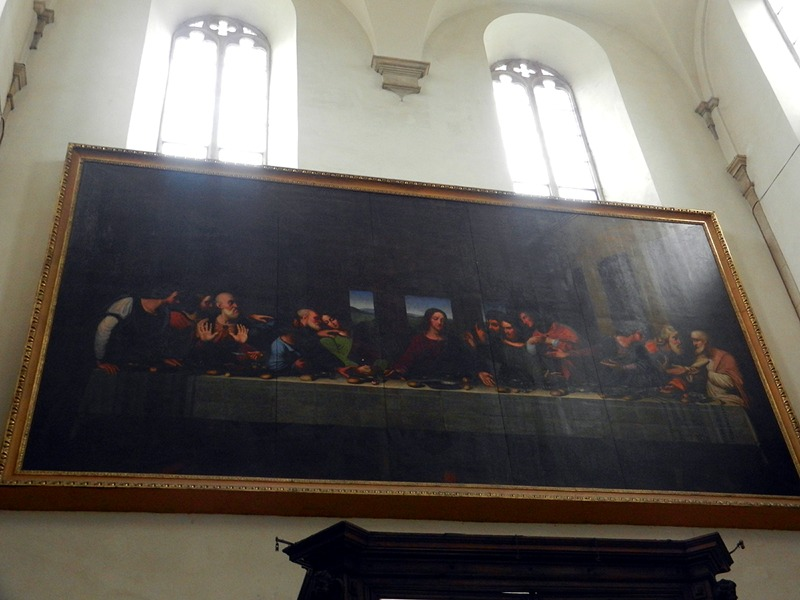 Torino - Dipinto dell'Ultima Cena, realizzato da Luigi Cagna nel 1835, custodito nel Duomo